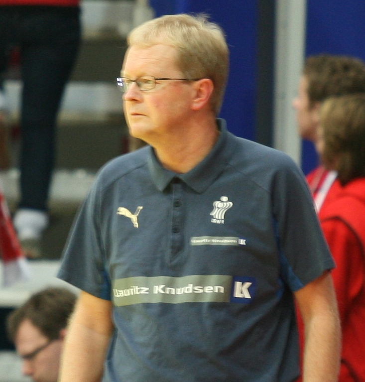 Ulrik_Wilbek dansk trener